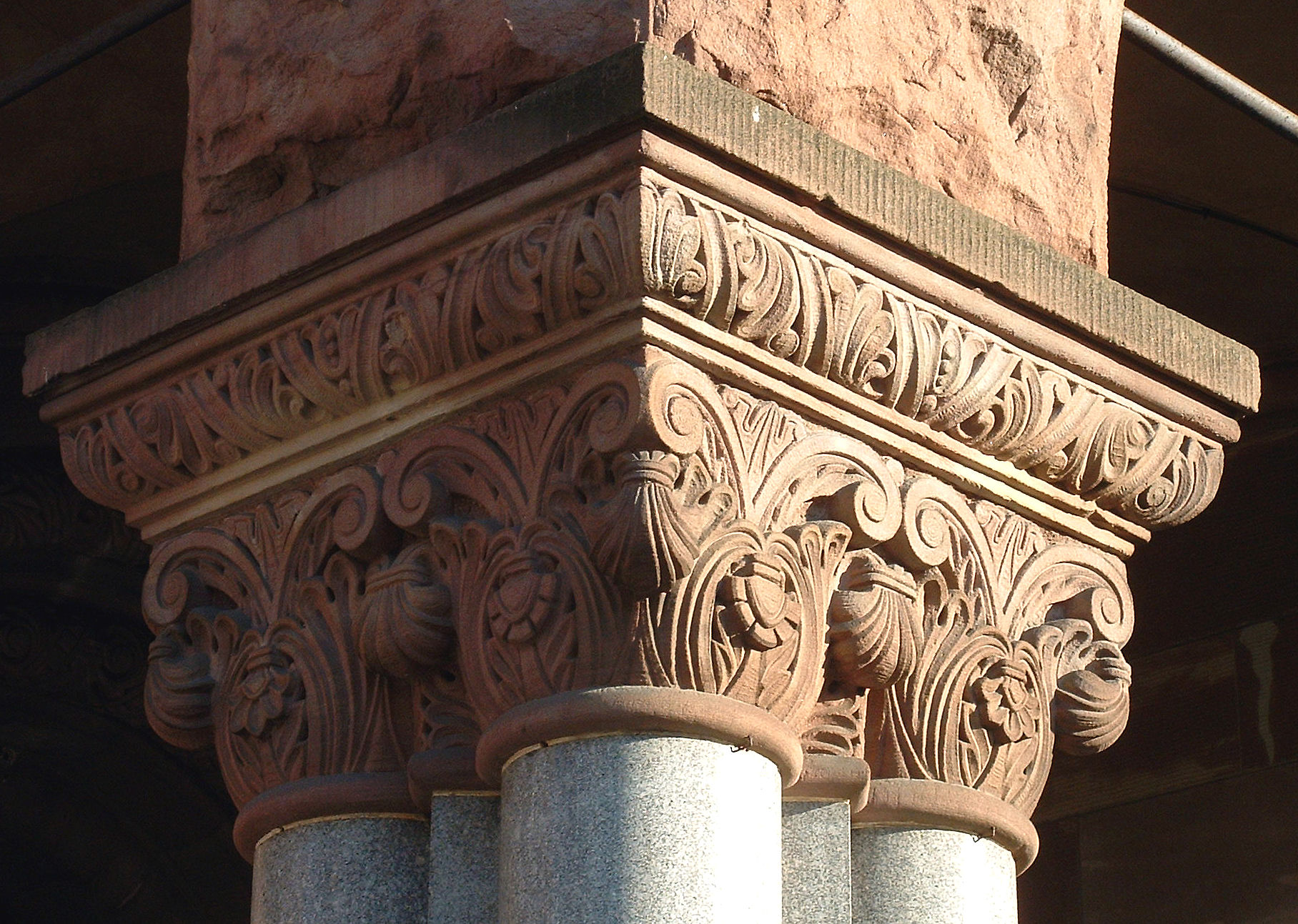 Metz - Poste principale - Chapiteau